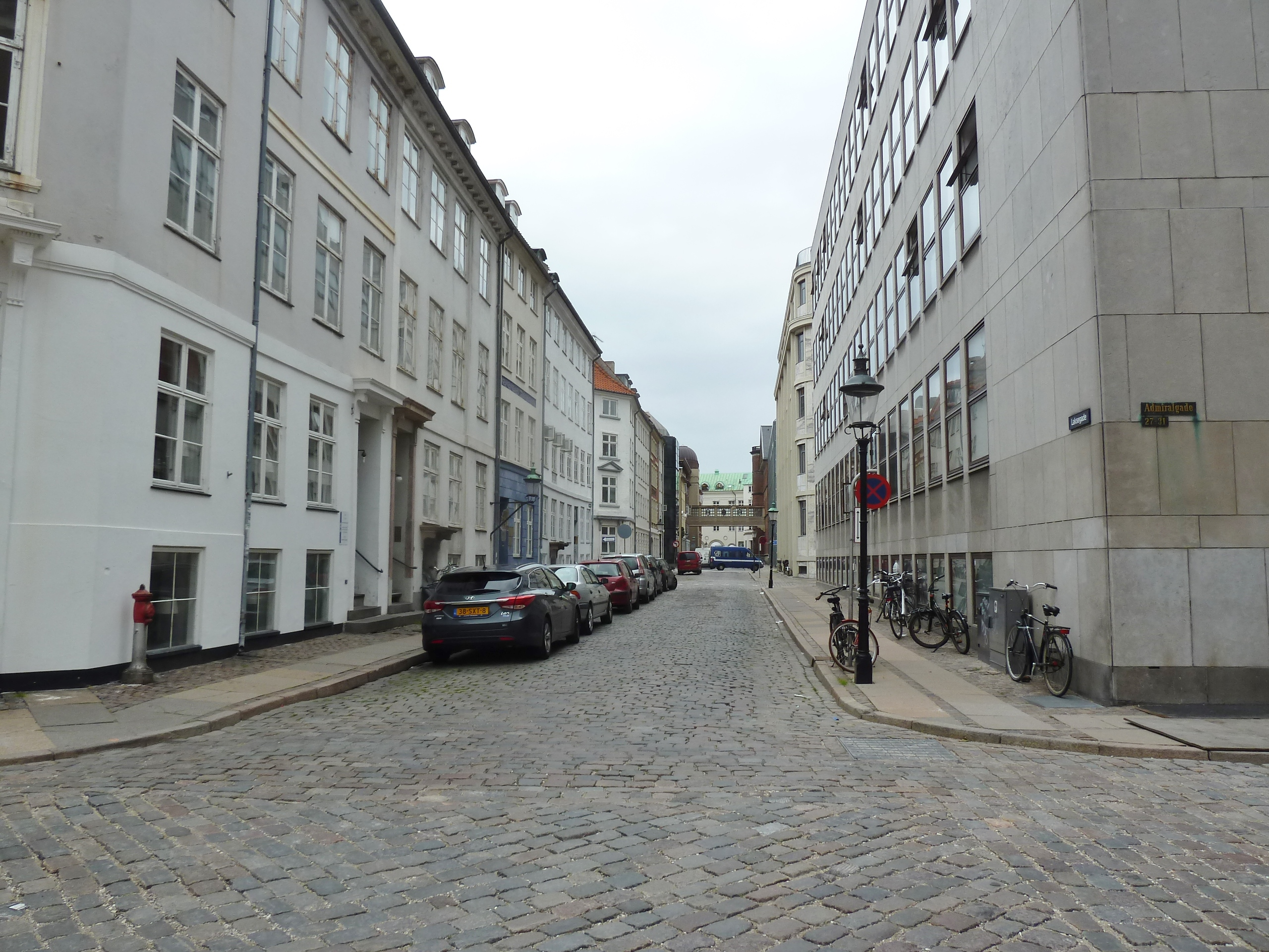 The street Laksegade in Indre By in Copenhagen.